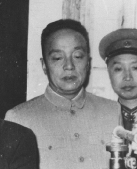 杨尚昆同志视察军工实习工厂